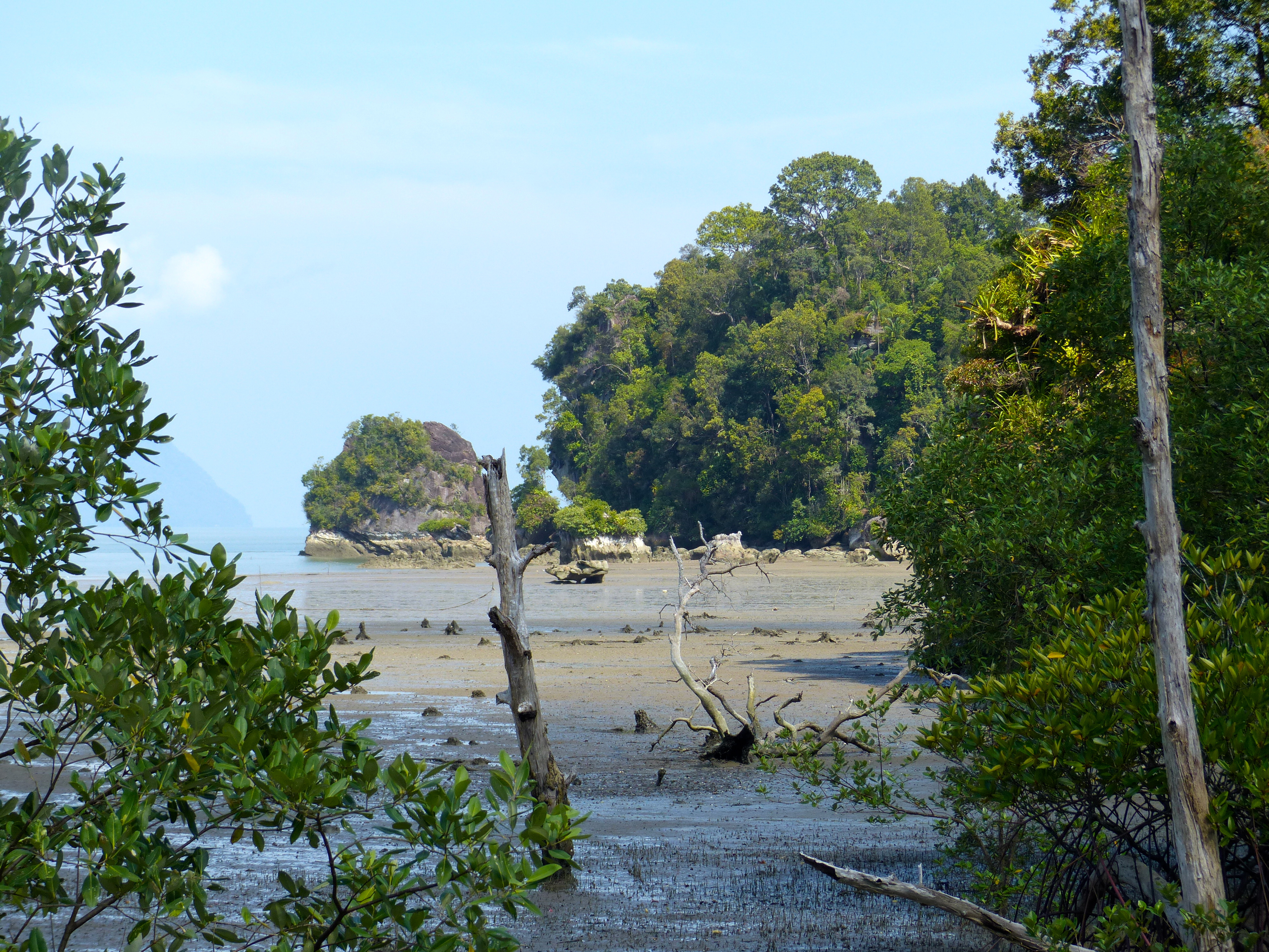 Bako NP, Sarawak, MALAYSIA